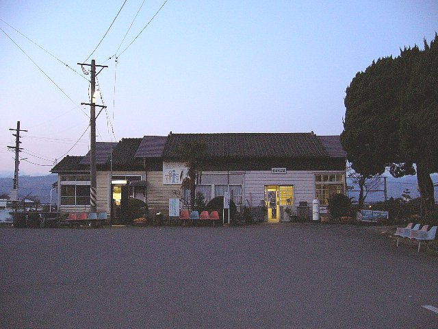 久大本線筑後大石駅 駅舎 2006年3月 Bakkai撮影